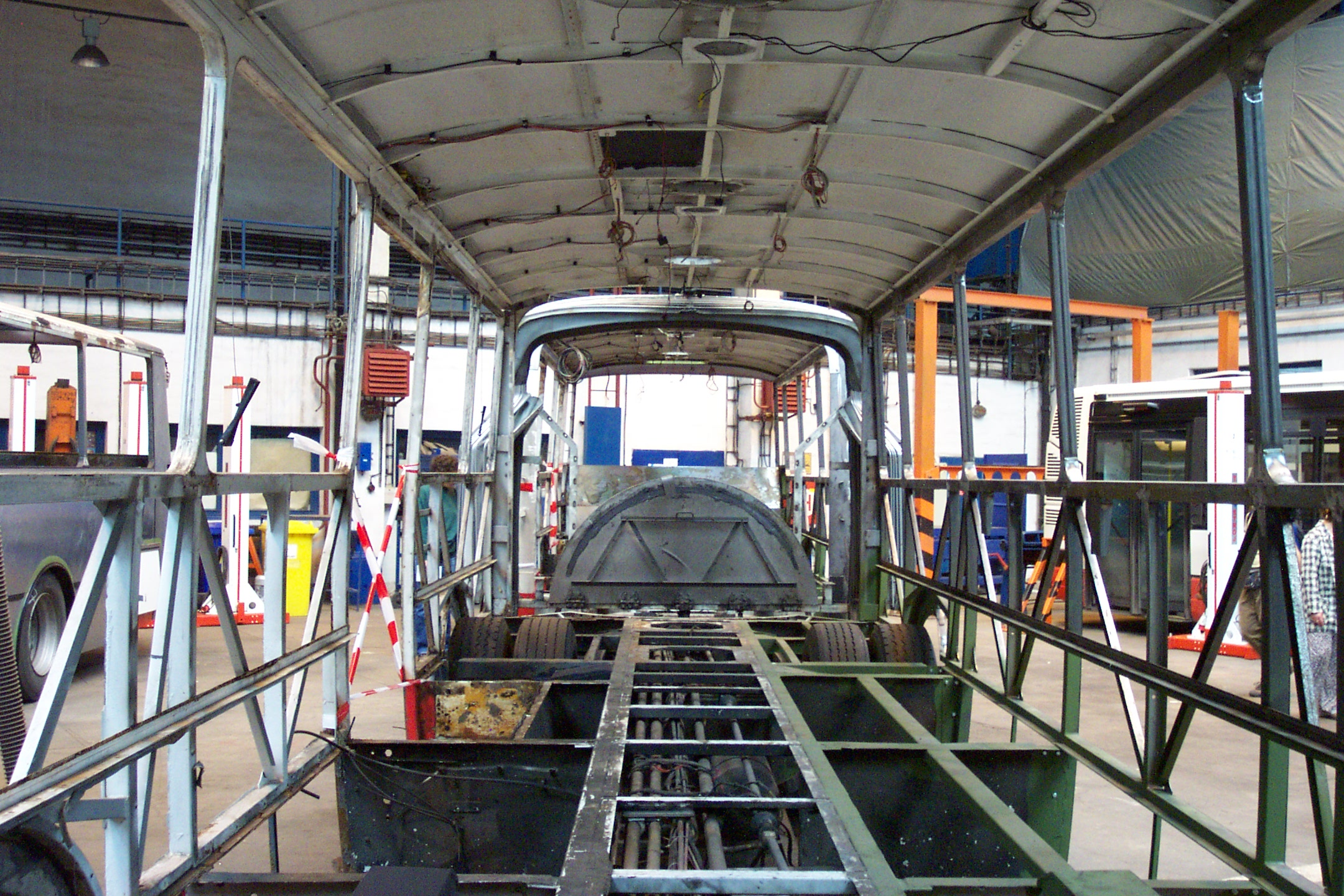 Bus type Karosa B 741 under reconstruction - Autobus typu B 741 procházející opravou.